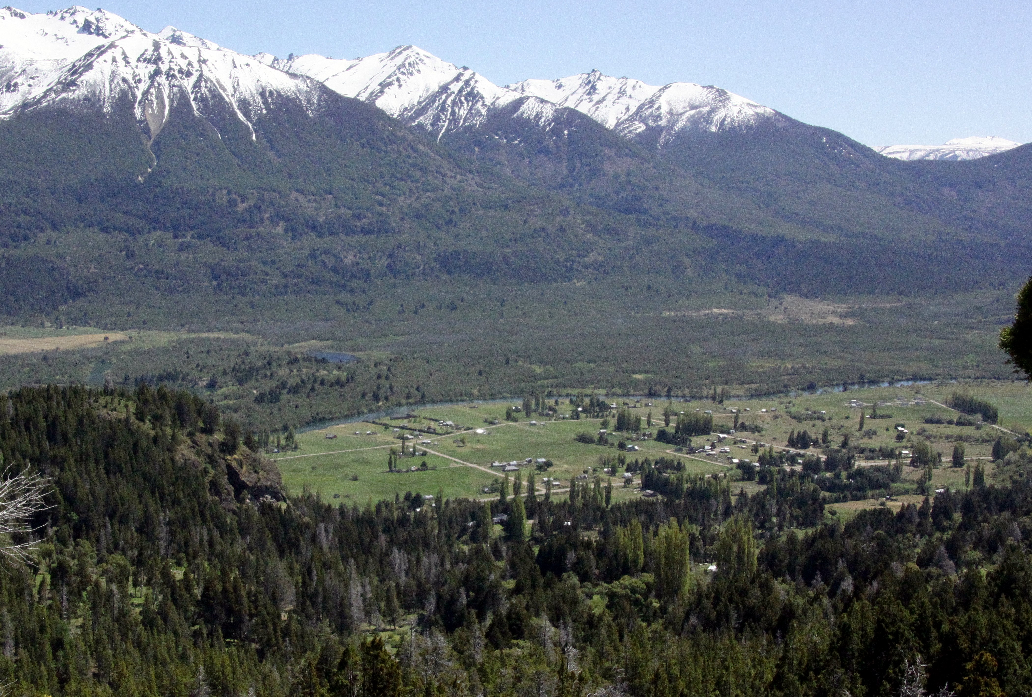 Vista panorámica de Villa Lago Rivadavia, Chubut, Argentina